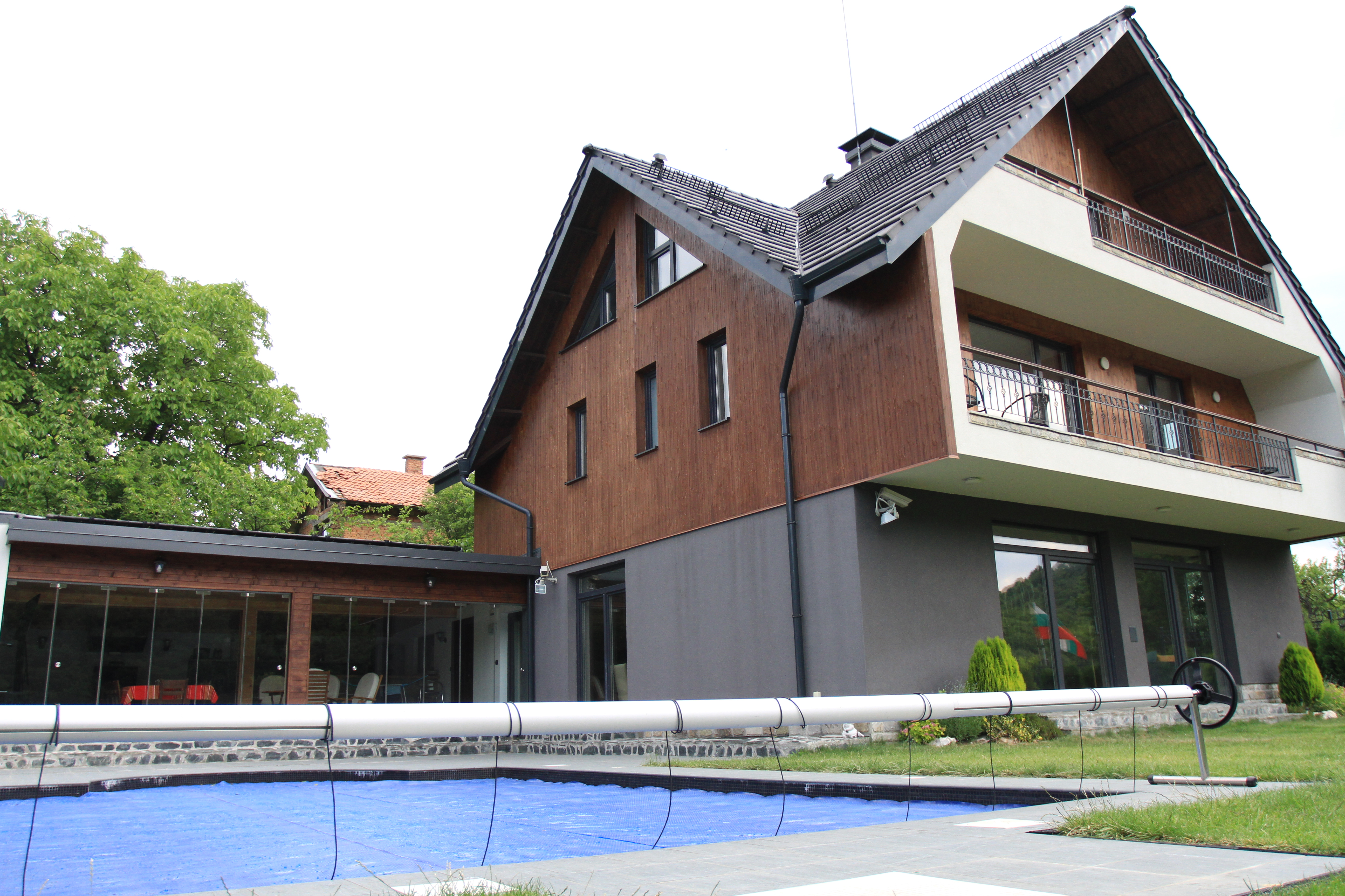 Къща за гости в с. Гълъбовци